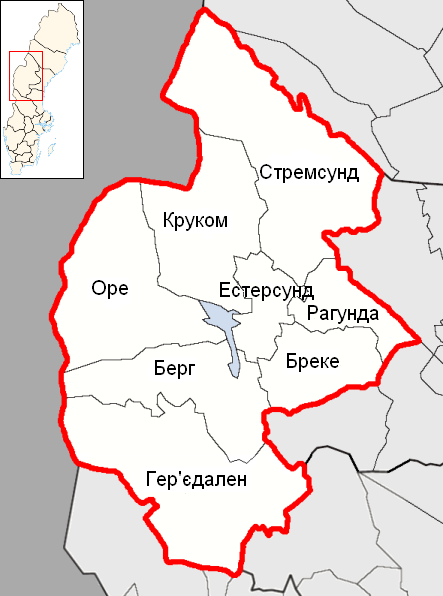 Карта адміністративного поділу лену Вестерботтен у Швеції. Карту створено на основі карти File:Jämtland County.png.